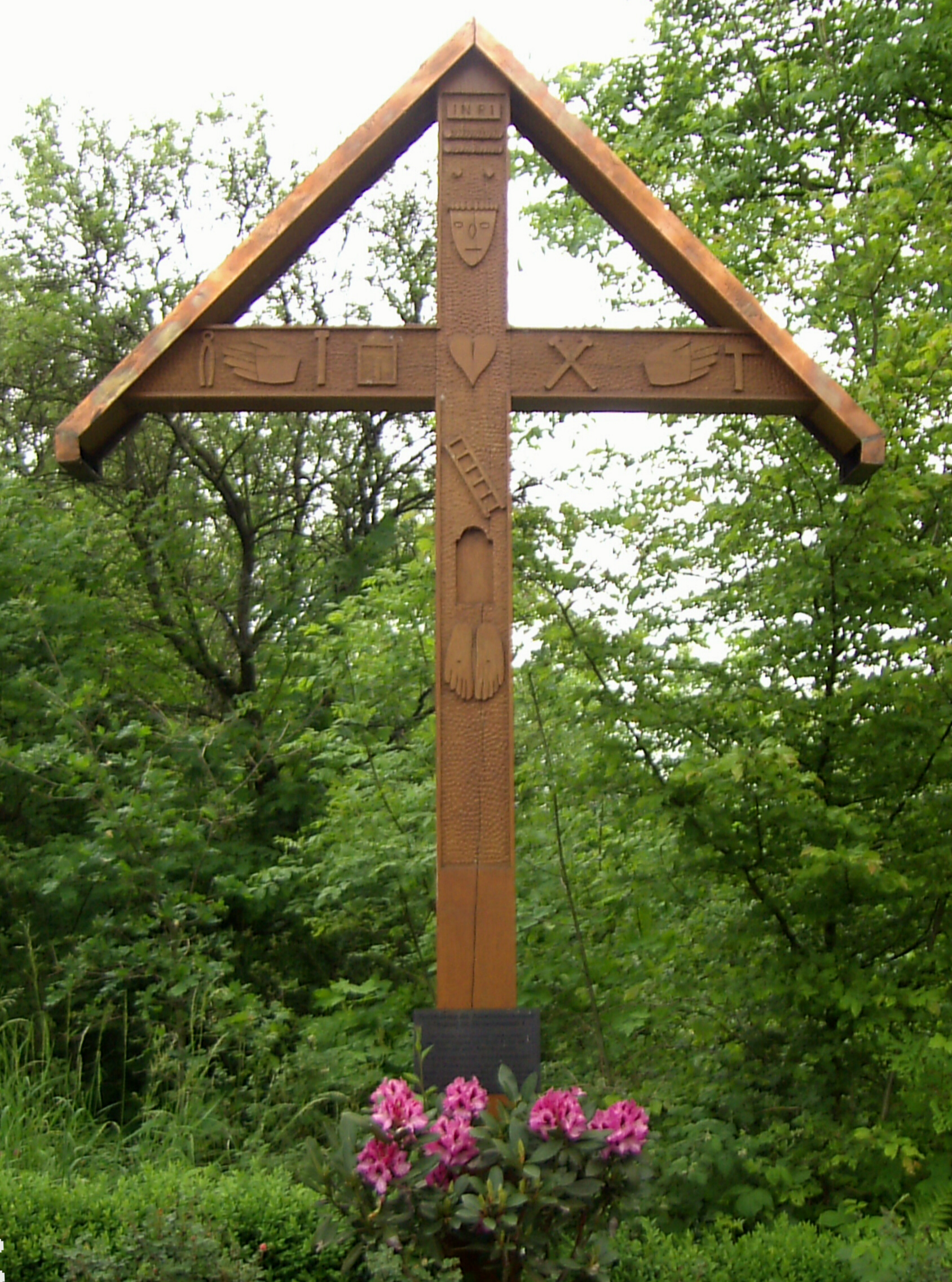 Nachbildung eines 1847 von Auswanderern aufgestelltes Arma-Christi-Kreuzes in Altwindeck, Nordrhein-Westfalen, Deutschland